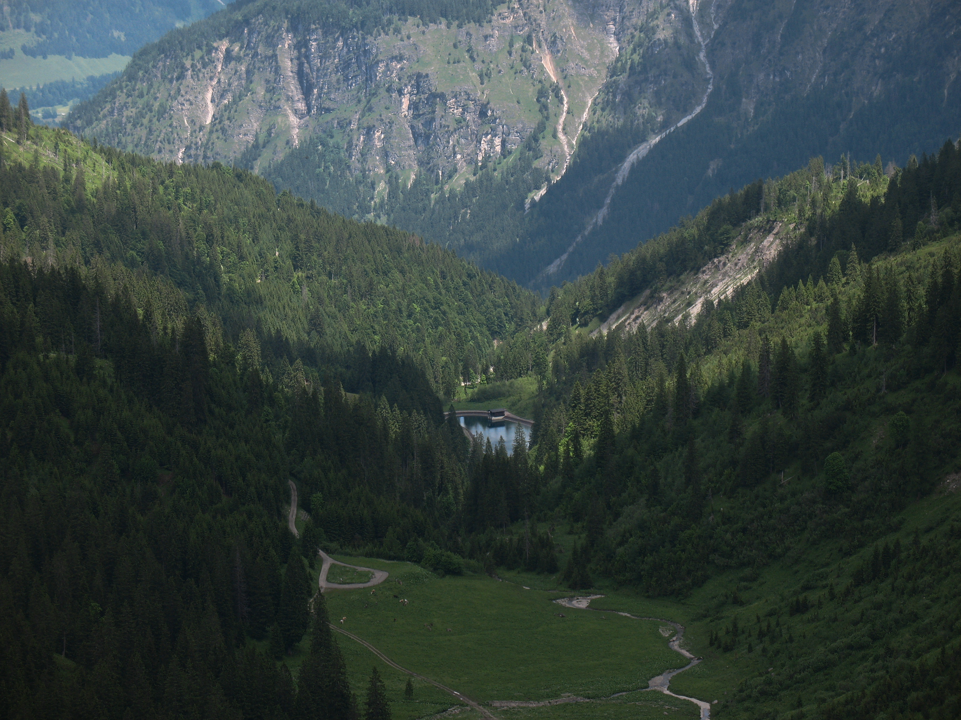 Das mittlere Warmatsgundtal im Bereich der Höfelealpe (1336 m) mit Warmatsgundbach und Oberem Speichersee des Pumpspeicherkraftwerks Warmatsgund.